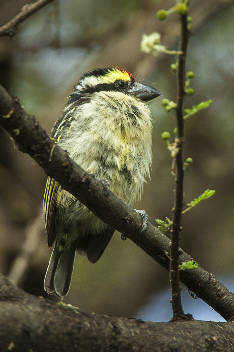 Red-fronted Barbet - Kenya_NH8O1387